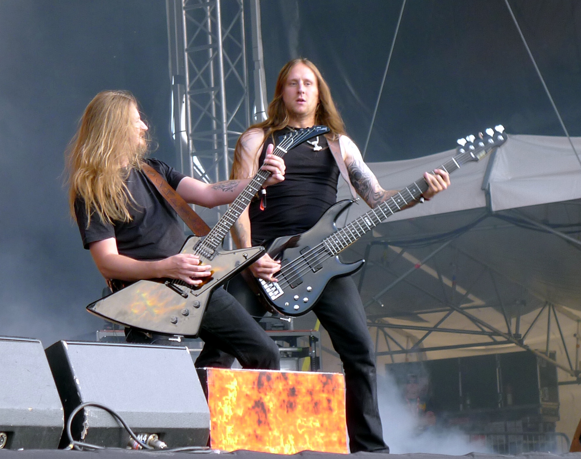 Amon Amarth live am Tuska Open Air 2011